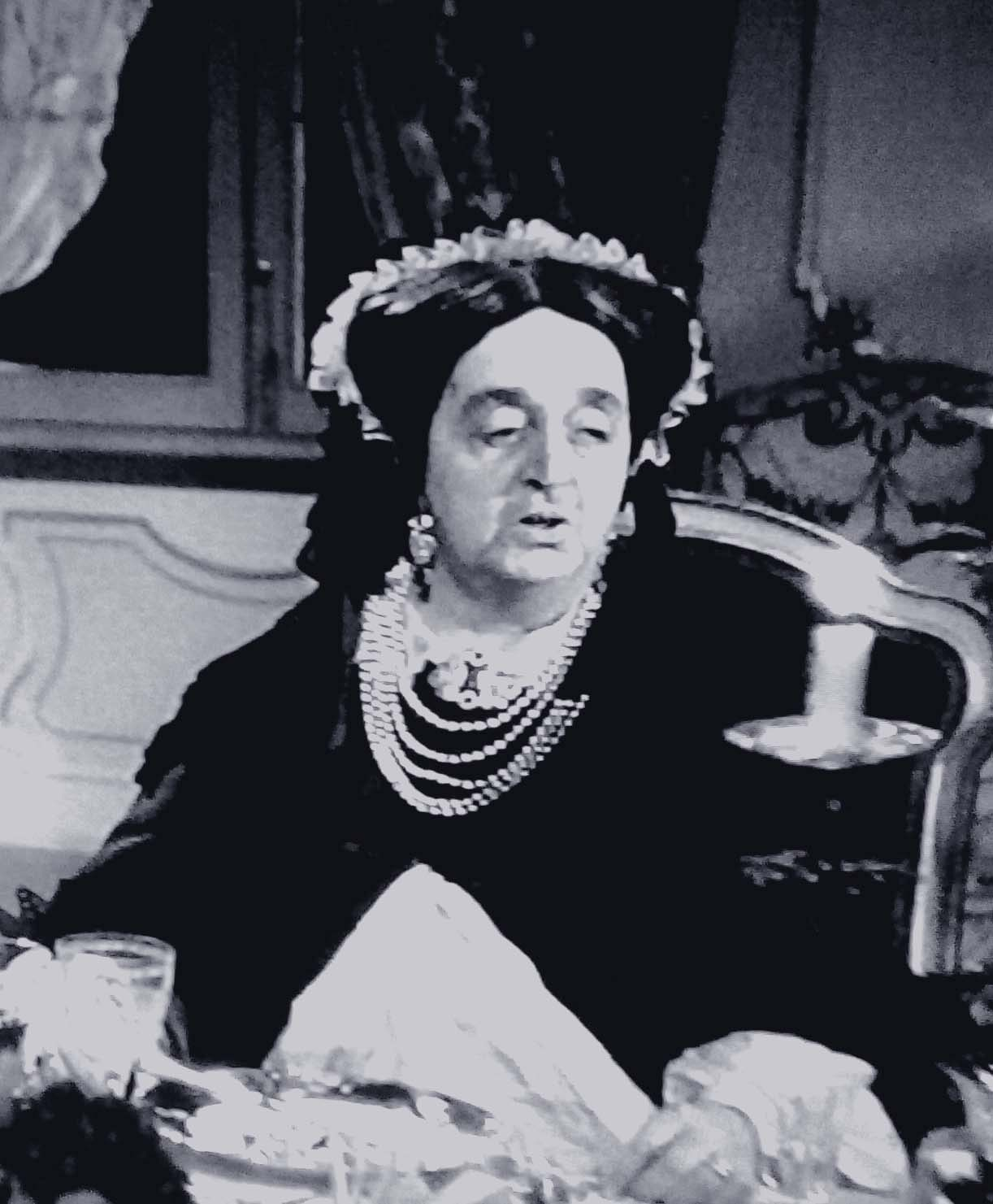 Ada Dondini è la marchesa Orsola Maironi in "Piccolo mondo antico" (Soldati, 1941)